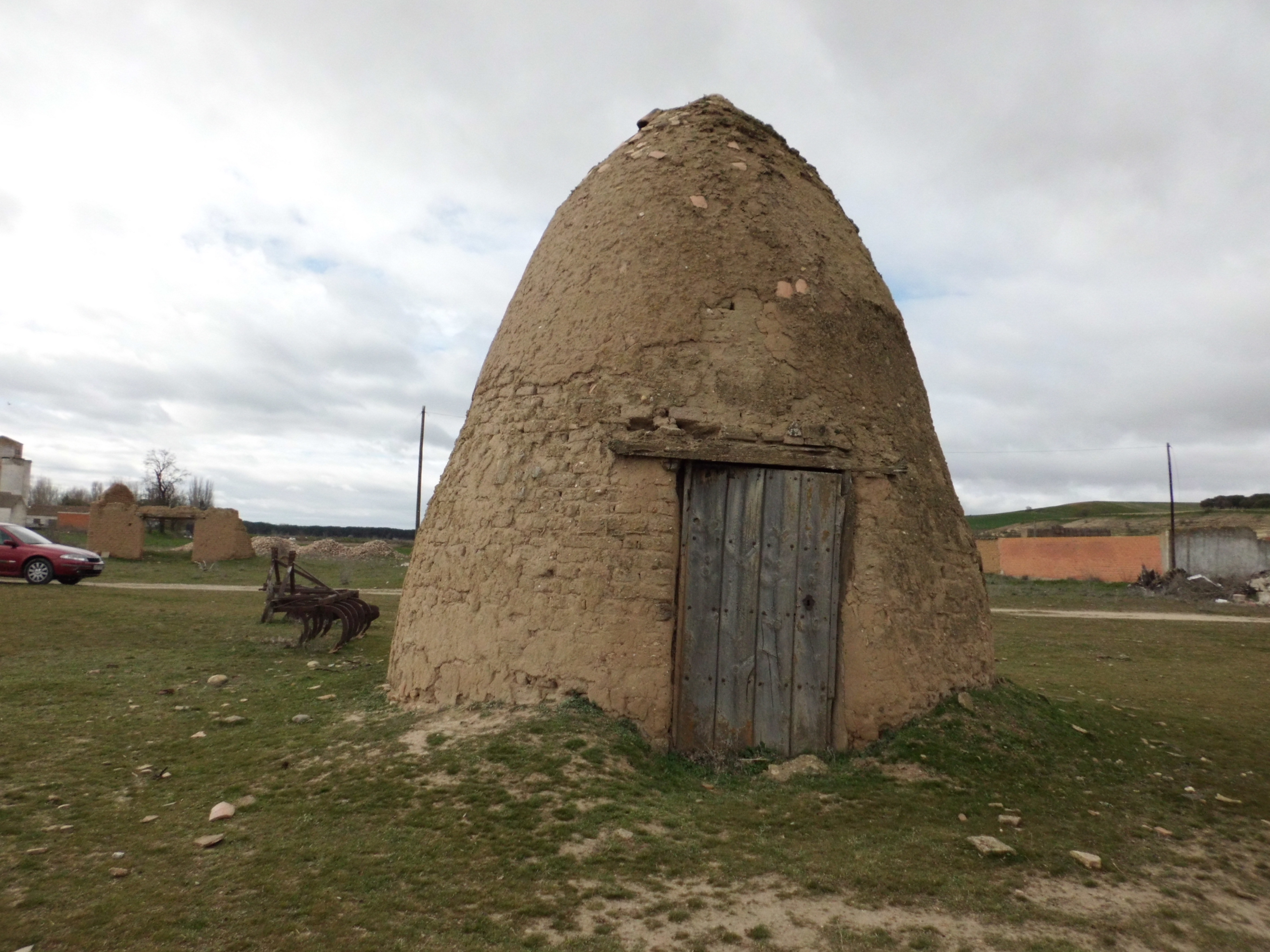 Torrecilla de la Abadesa, provincia de Valladolid (España). En el espacio que fueron las eras se conservan estas cabañas que en Torrecilla llaman cabochas y que se utilizaban para guardar los aperos y atalajes. Tienen forma de bala de cañón.